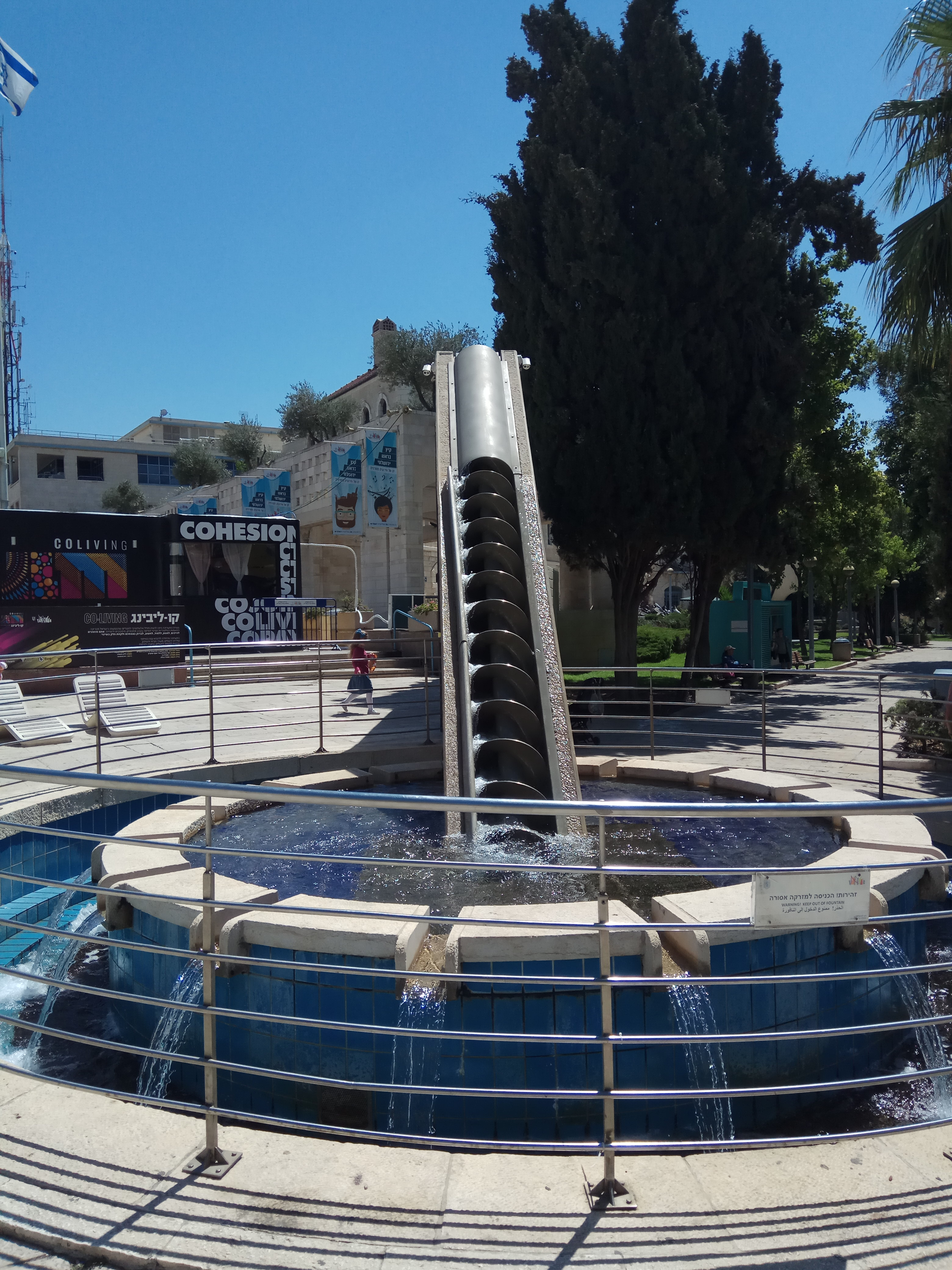 מזרקת בורג ארכימדס בכיכר ספרא בירושלים